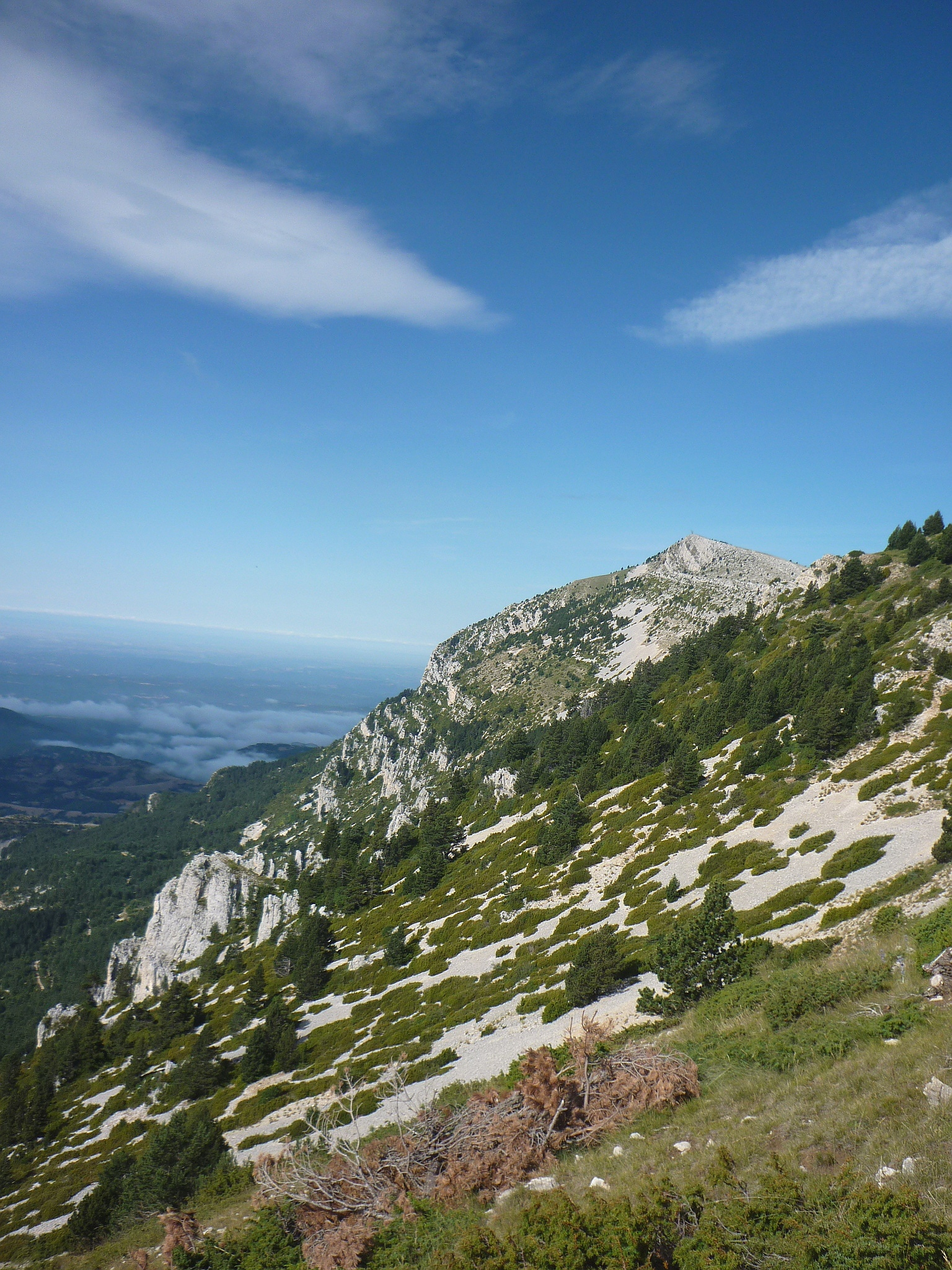 Accidentat vessant meridional de la Serra de Querol, amb elPuig de les Morreres al fons